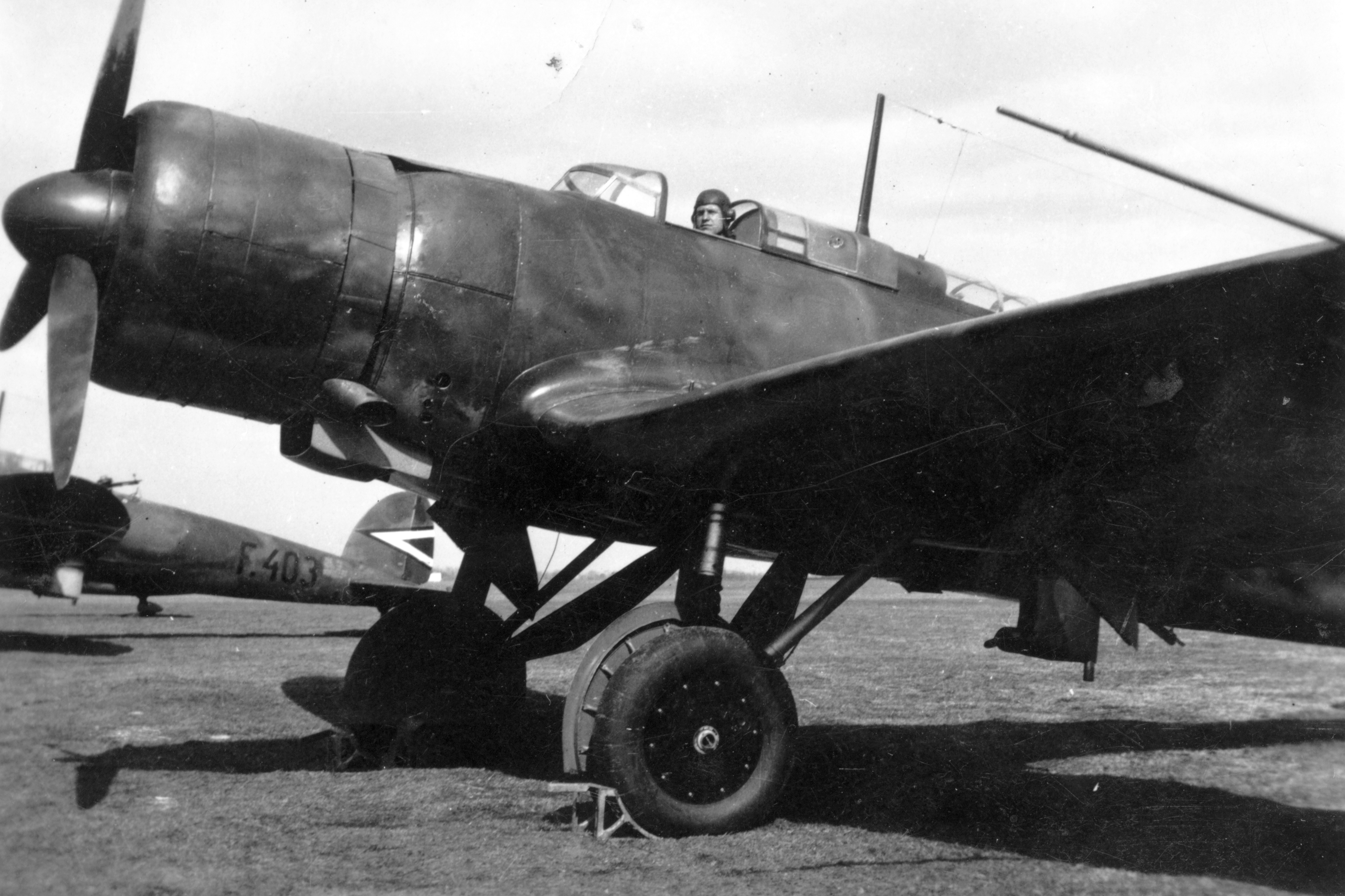 Heinkel He-70K típusú távolfelderítő repülőgép. Tags: Royal Hungarian Air Force, airport, Heinkel-brand, transport, military, Gerrman brand Title: Heinkel He-70K típusú távolfelderítő repülőgép.